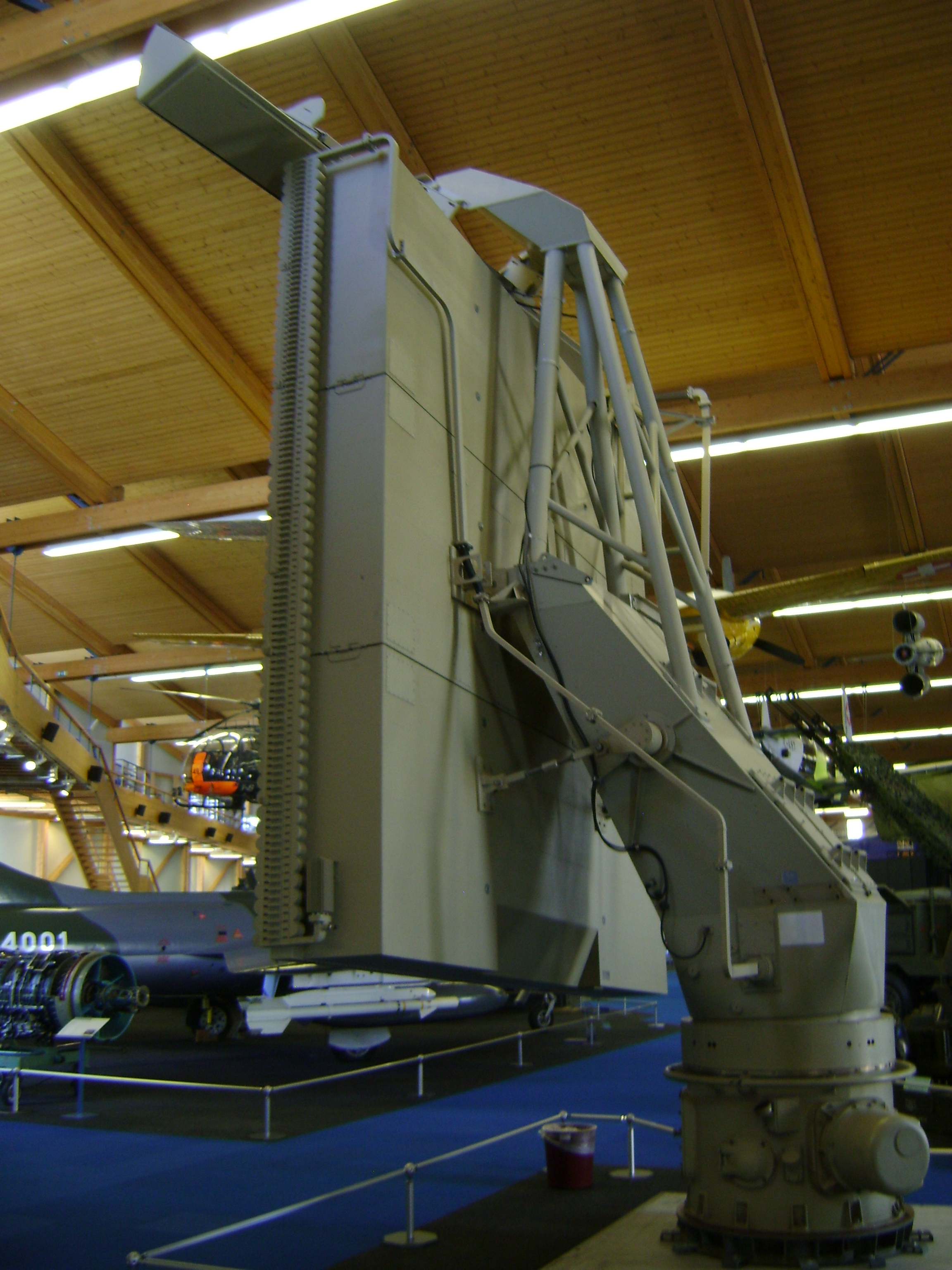 FLORIDA Radar back